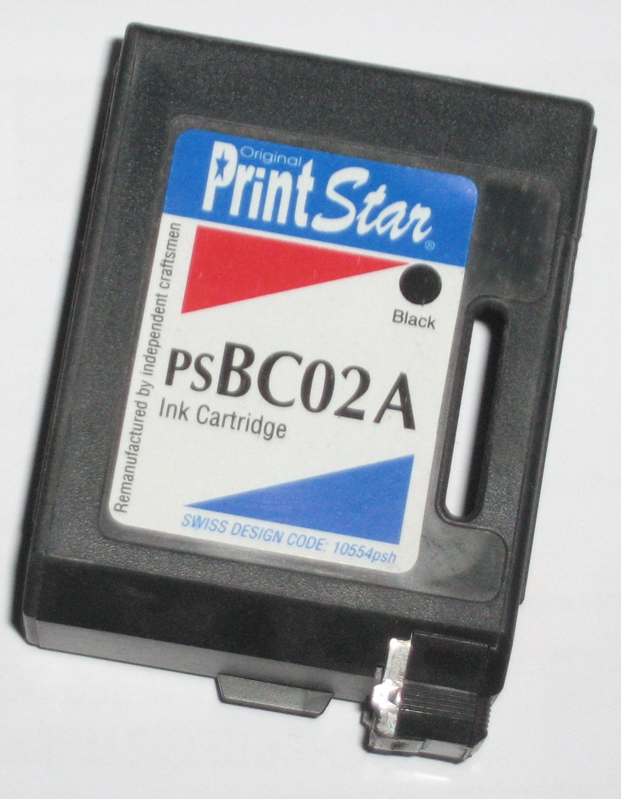 Druckerpatrone aus PPE/PS